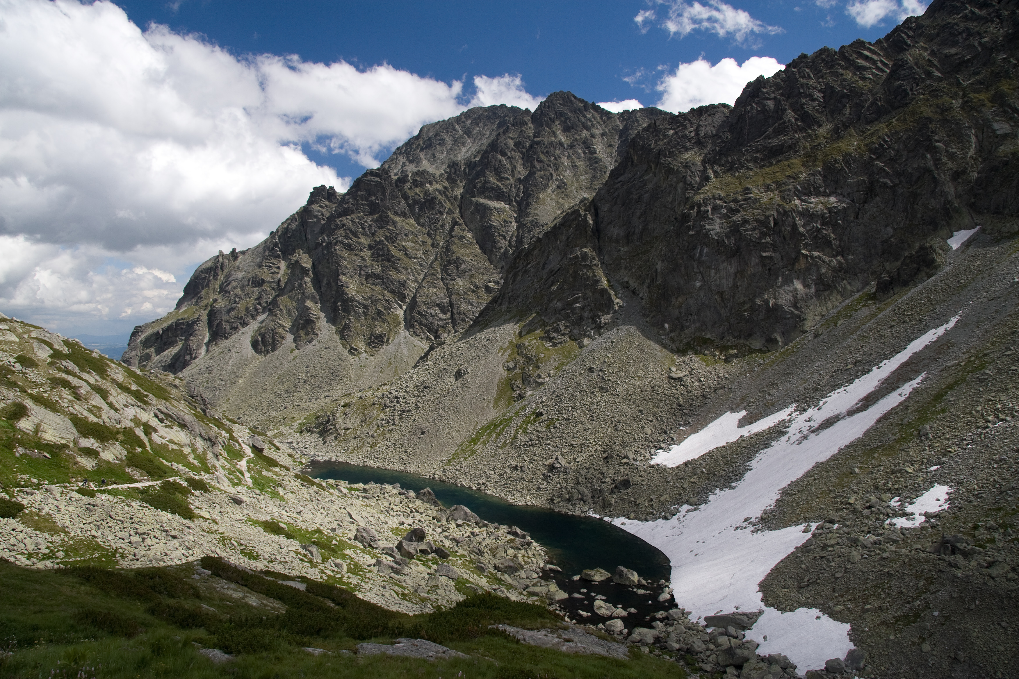 Dlhé pleso